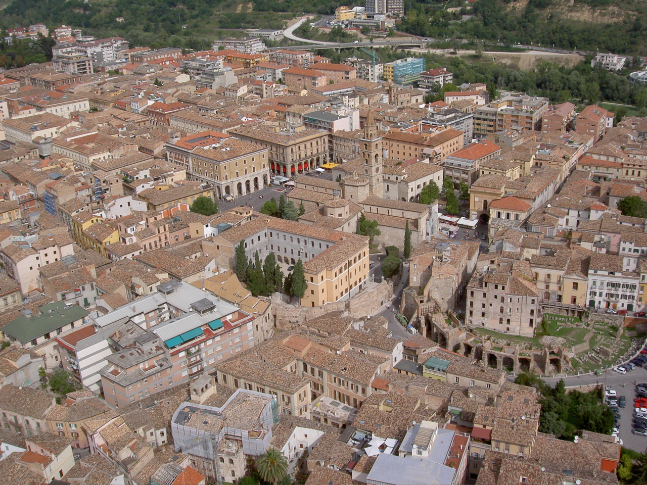 Gianluigi Camillini Fotolaser digital express Teramo, archivio di Gianluigi Camillini, Foto aerea di Teramo, GFDL, l'amico autore ha concesso di poter pubblicare la foto Licensing Categoria:Immagini di Teramo